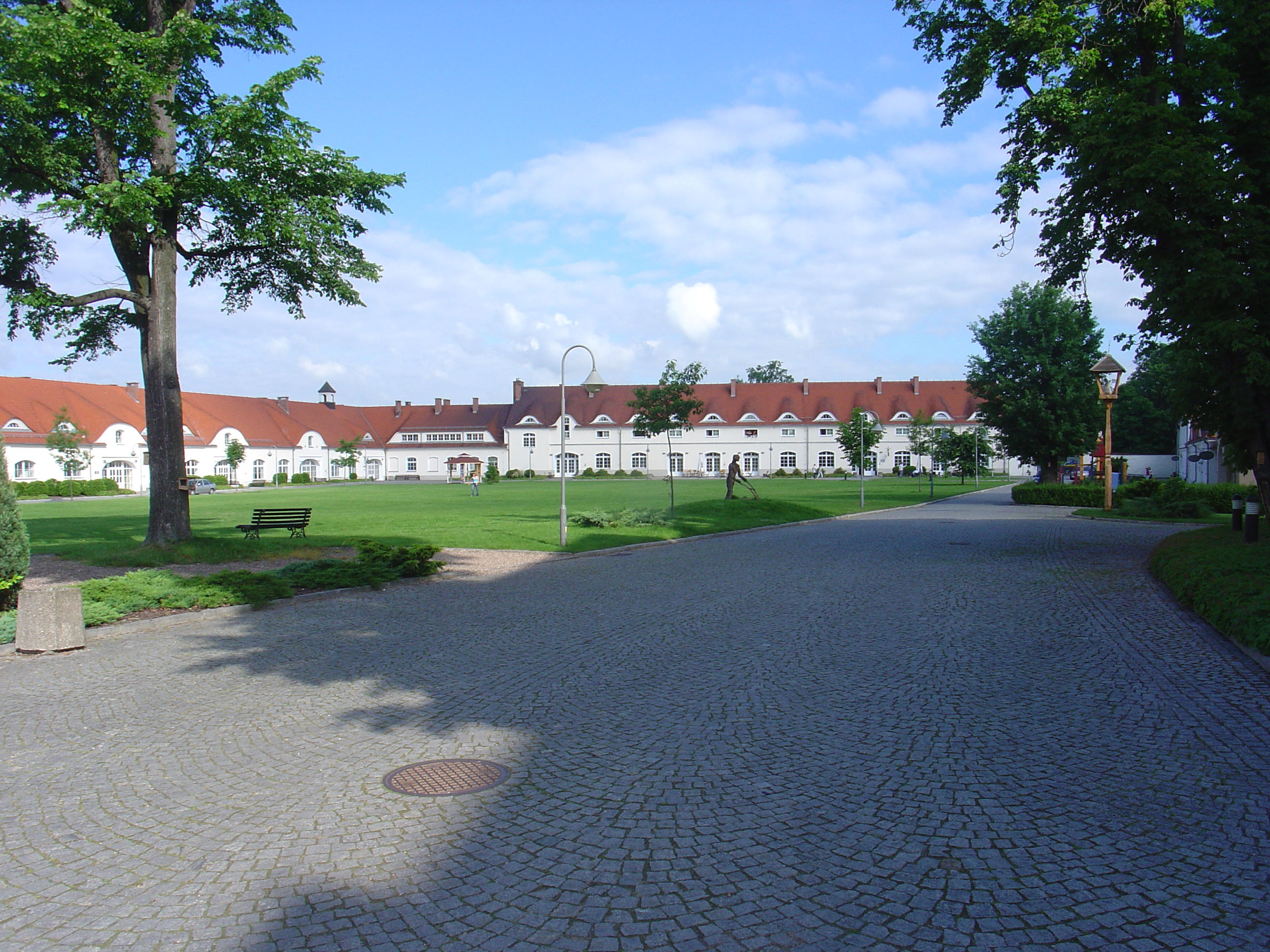 Der Gutshof der Familie von Moltke. Heute wird das weitläufige Gut als Internationale Jugendbegegnungsstätte benutzt..